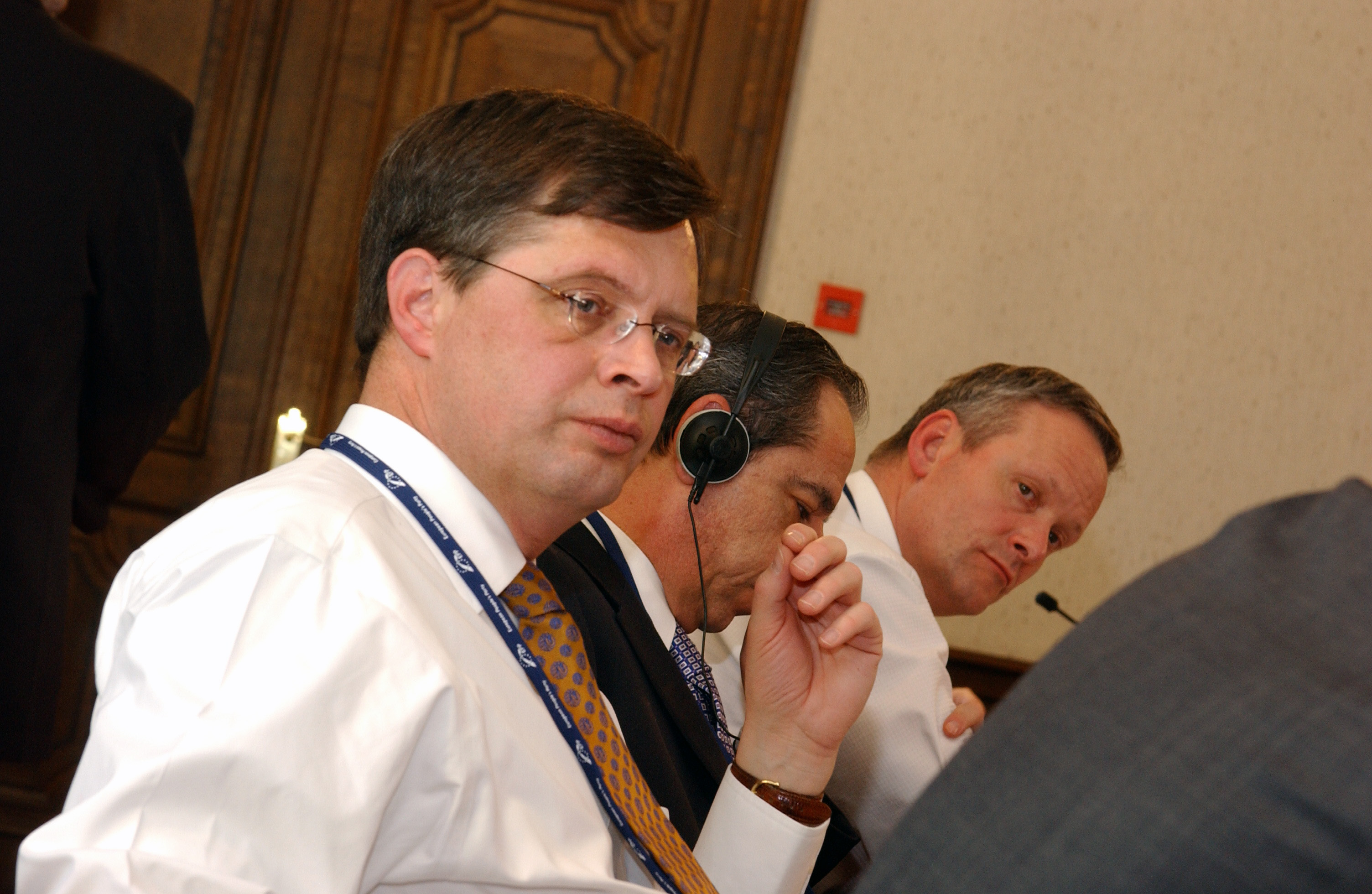 EPP Summit 23 March 2006